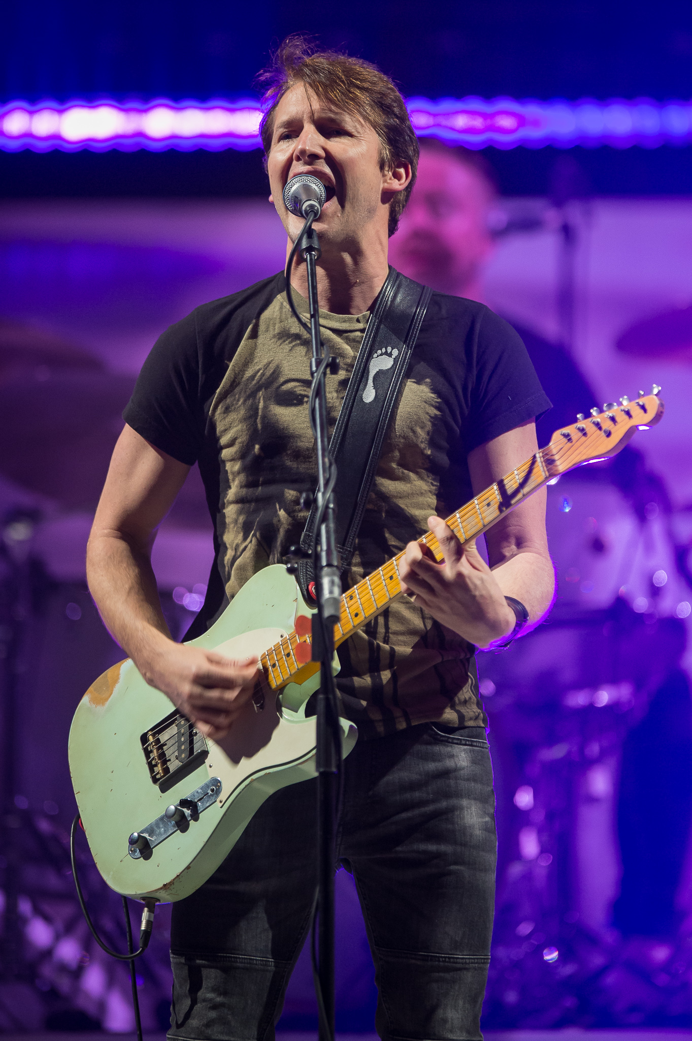 Arena Nürnberger Versicherungen,Concertbüro Franken,James Blunt,Konzert,Livekonzert,Livemusik